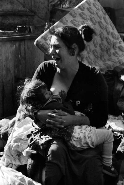 Depois de um Incêndio que lhe levou a casa, no meio dos haveres que lhe restam a preocupação desta mãe é dar alimento ao seu filho e chorar silenciosamente... Imagem, 7 de 36 imagens da colecção Incêndio na Amadora, 1998.